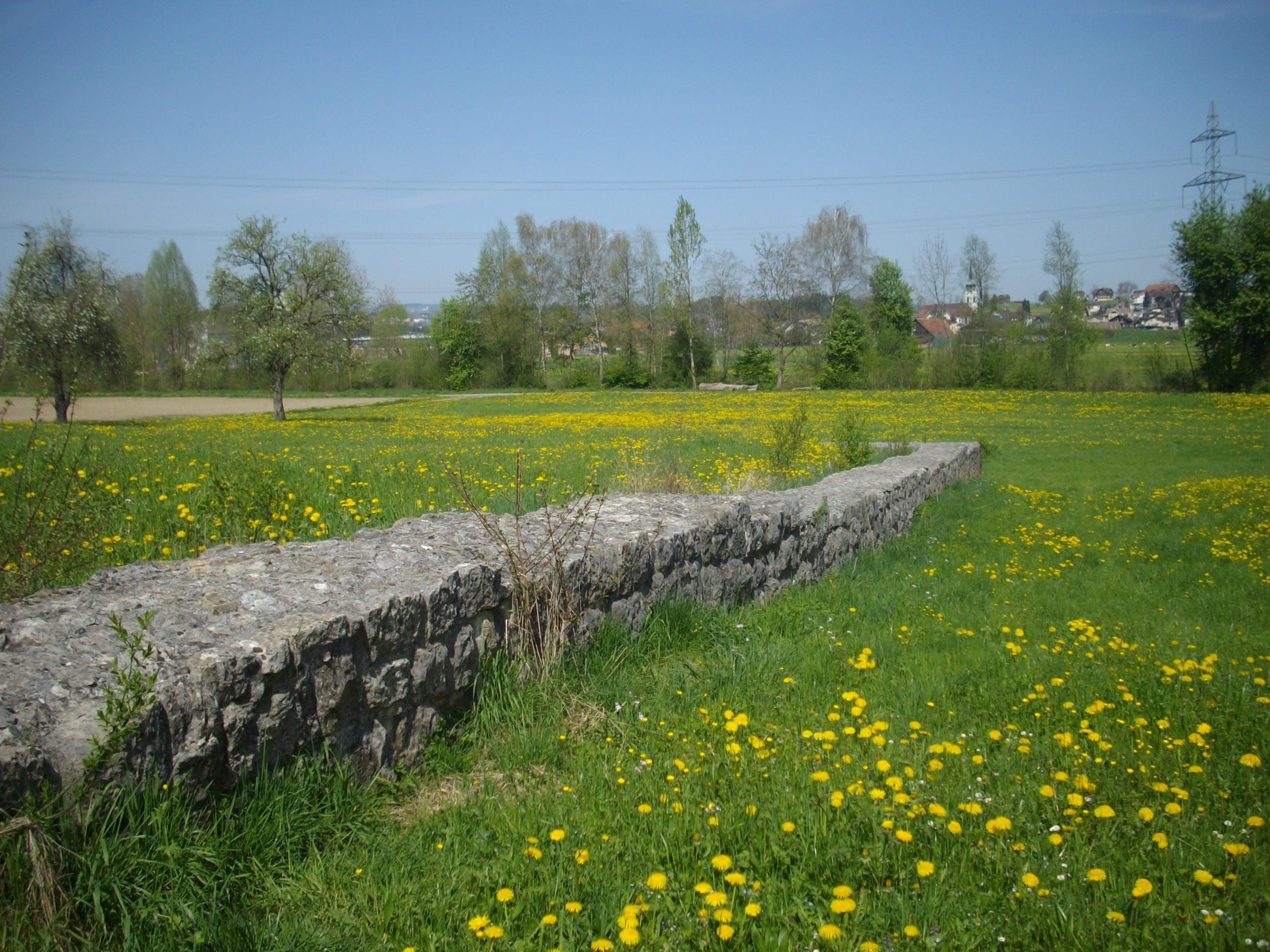 Konservierte Reste der Stadmauern